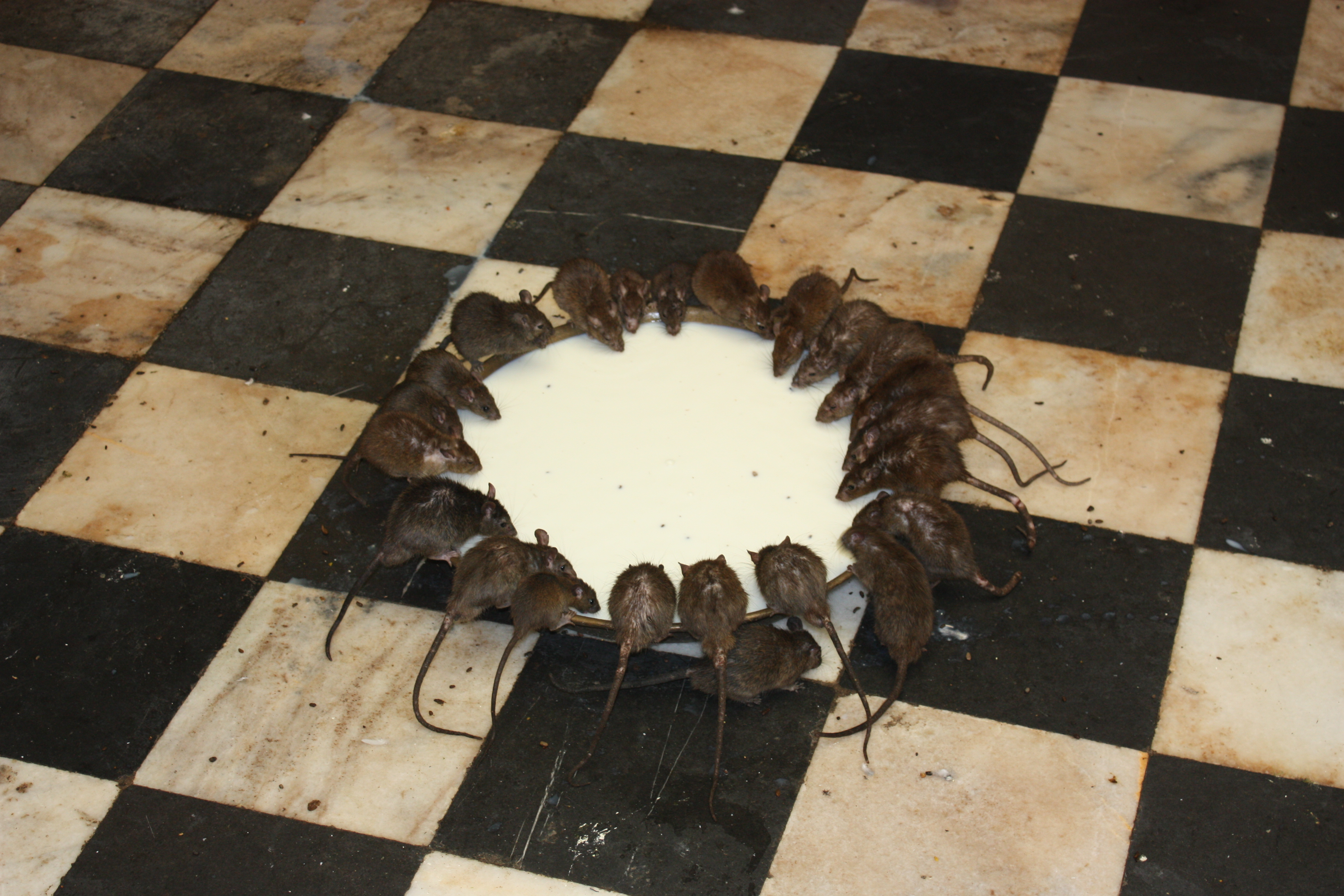 Deshnok, Karni Mata Temple